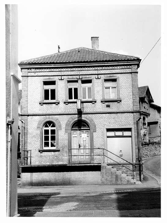 Synagoge (Adelsheim) Nutzungsbedingungen ausdrücklich auch für Wikipedia (siehe: [1]